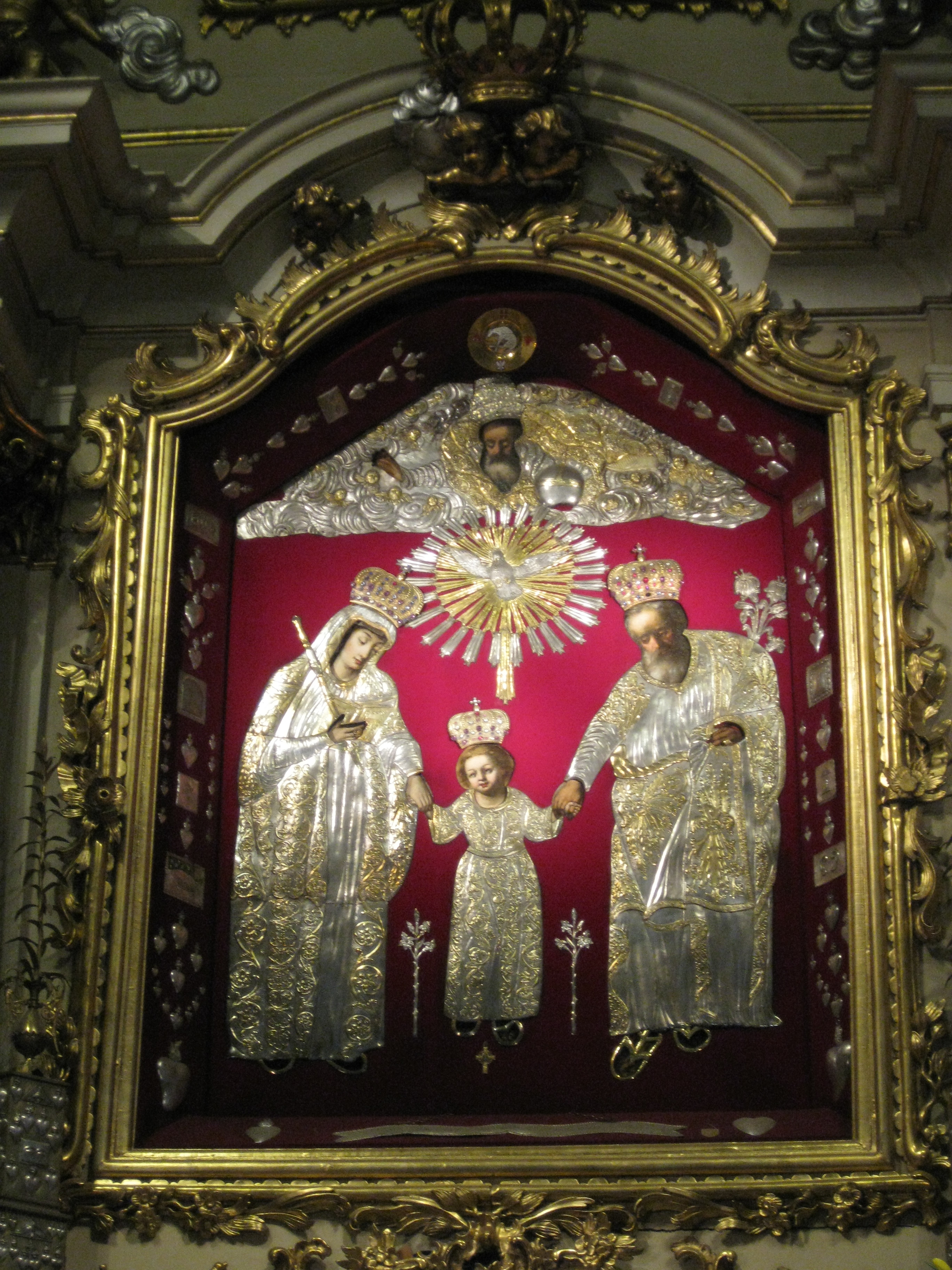 Kalisz - Kolegiata pw. Wniebowzięcia NMP